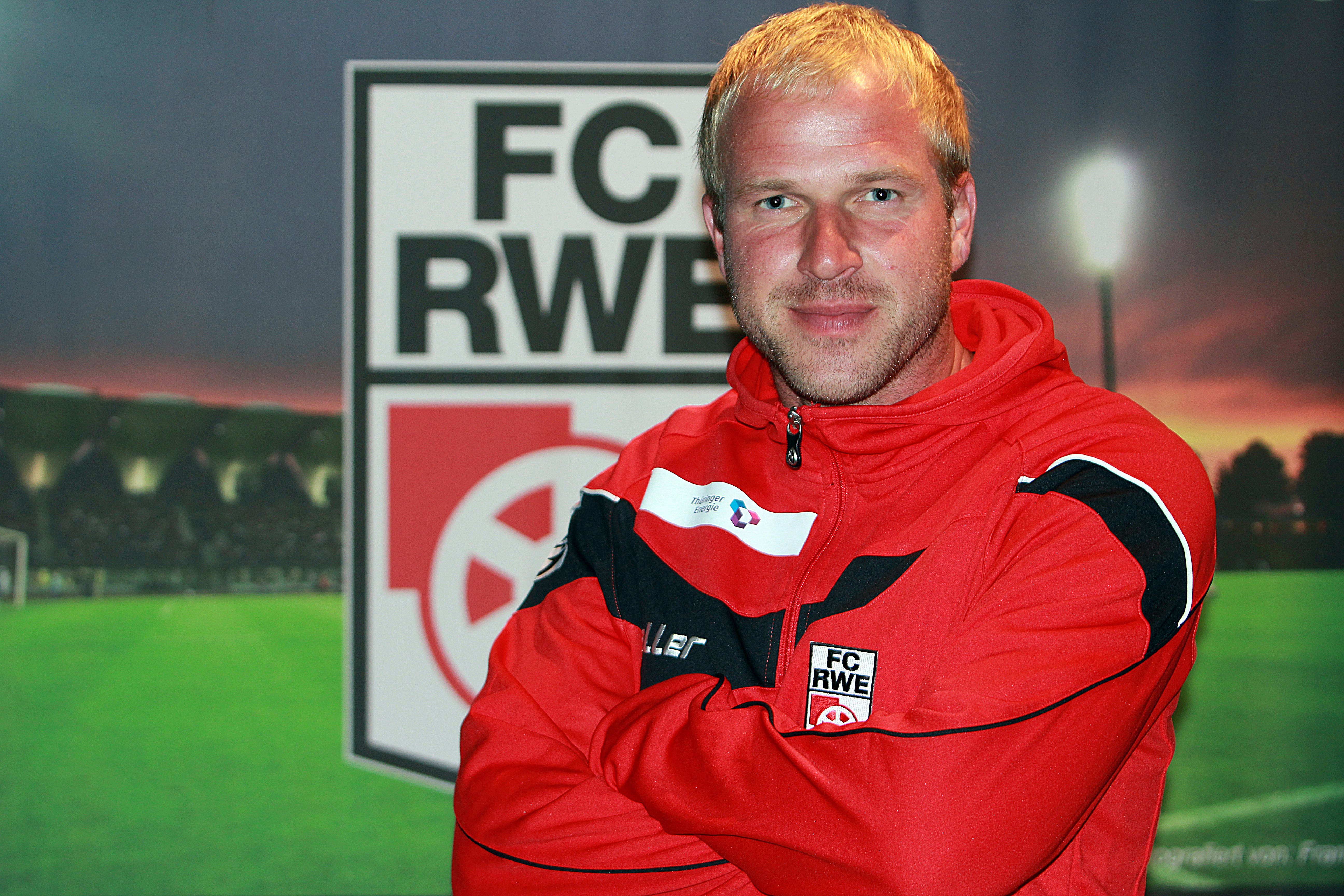 Norman Loose